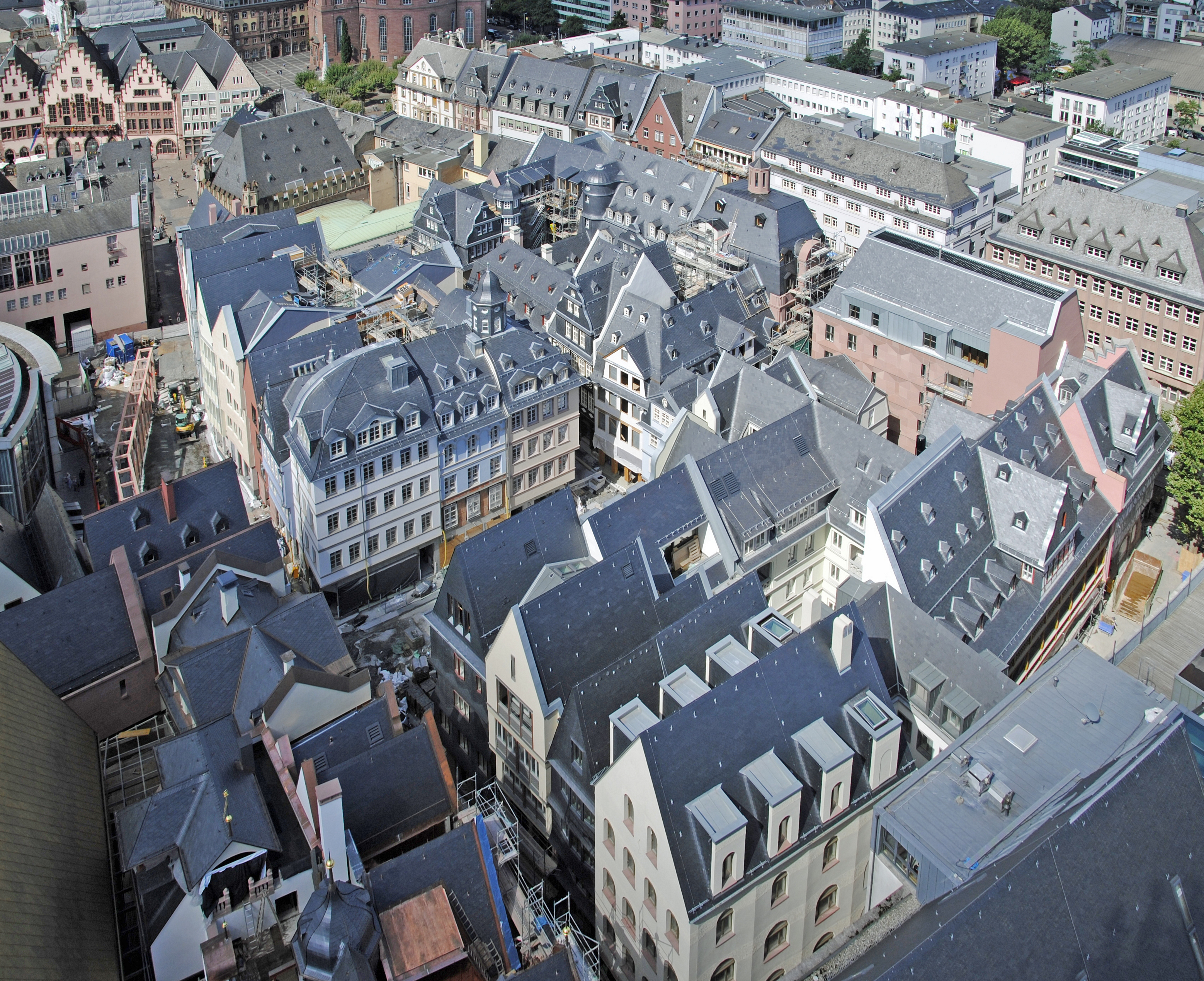 Frankfurt DomRömer